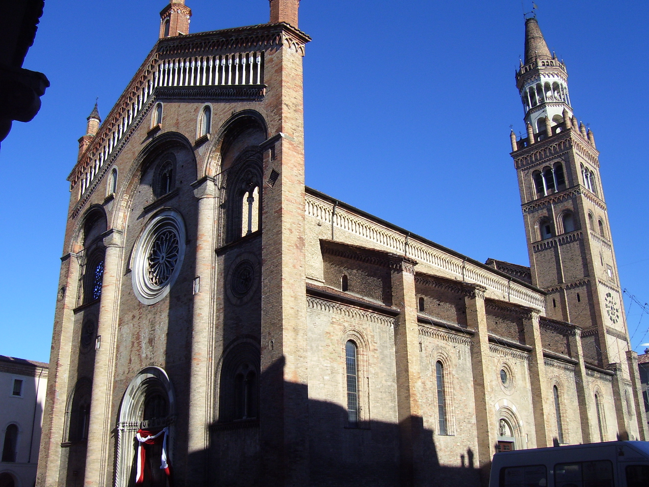 Duomo della città di Crema (CR)